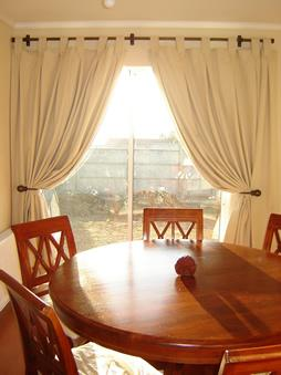 Cortina con presilla en tela Yute, color Beige, con barra de hierro embebecido.